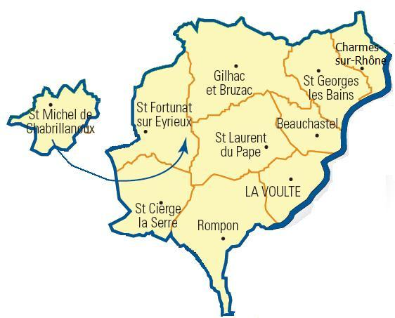 Carte détaillée des communes du canton (Ardèche)